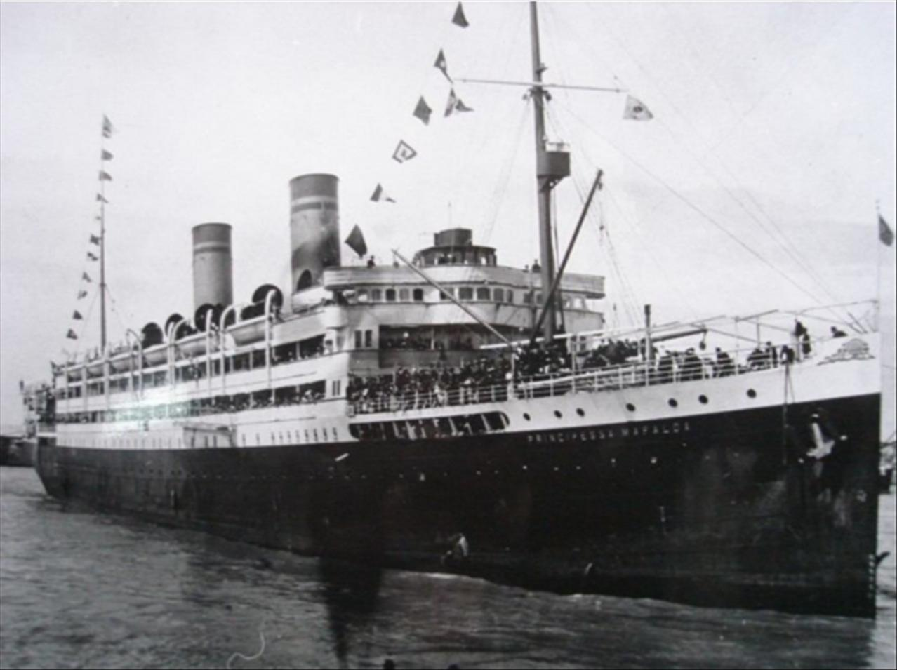 Foto do navio Principessa Mafalda de bandeira italiana que naufragou em 25 de outubro de 1927, devido ao rompimento do tubo telescópico do eixo do hélice direita, na costa do Estado da Bahia, Brasil.